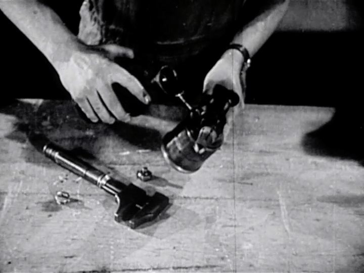 Présentation des outils à employer pour la soudure de tuyaux de plomb. Comment souder et exécuter quelques petits travaux. Outre que ça peut être utile de savoir comment réparer sérieusement une fuite (mais, de nos jours, complètement inutile de vouloir réparer un poste de radio), la mise en situation des années 50 est très réjouissante.